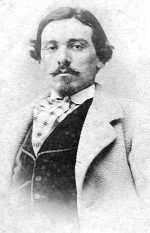 Eduardo María González Pondal Abente (1835-1917)